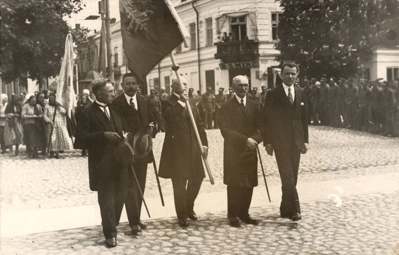 Suwałki, skrzyżowanie dzisiejszych ulic Kościuszki i Chłodna.